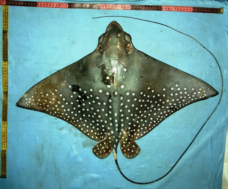 Скат рода пятнистых орляков